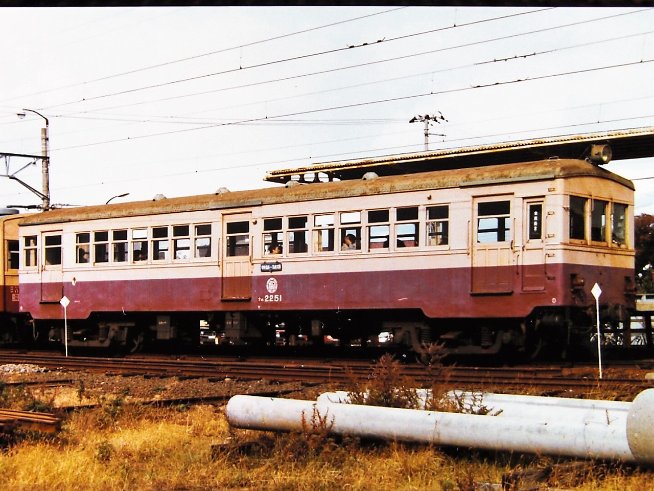 弘南鉄道クハ2251 旧富士身延鉄道買収国電